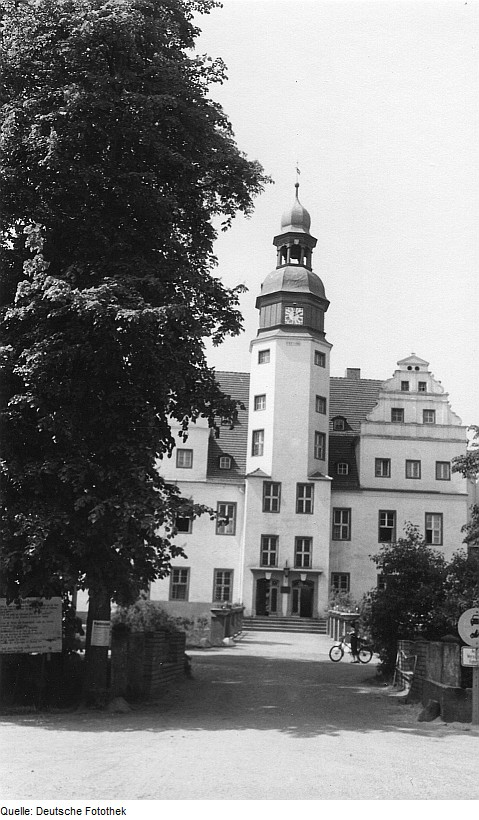 Original image description from the Deutsche Fotothek Lindenau. Schloß, zu dem die Wassermühle am Park gehörte